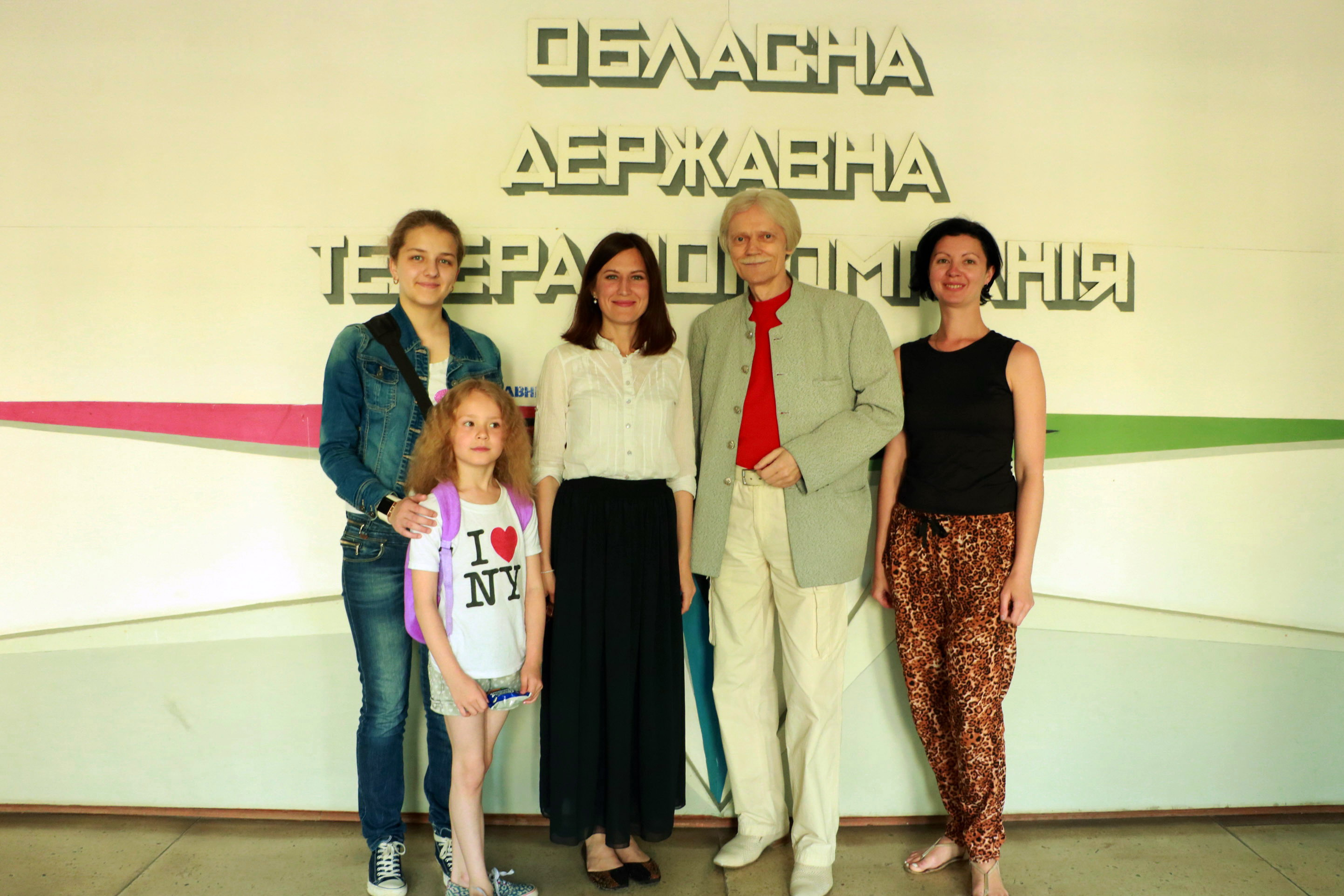 Сергій Сірий із учасниками творчого проекту «Medialab» у Тернопільській обласній державній телерадіокомпанії.